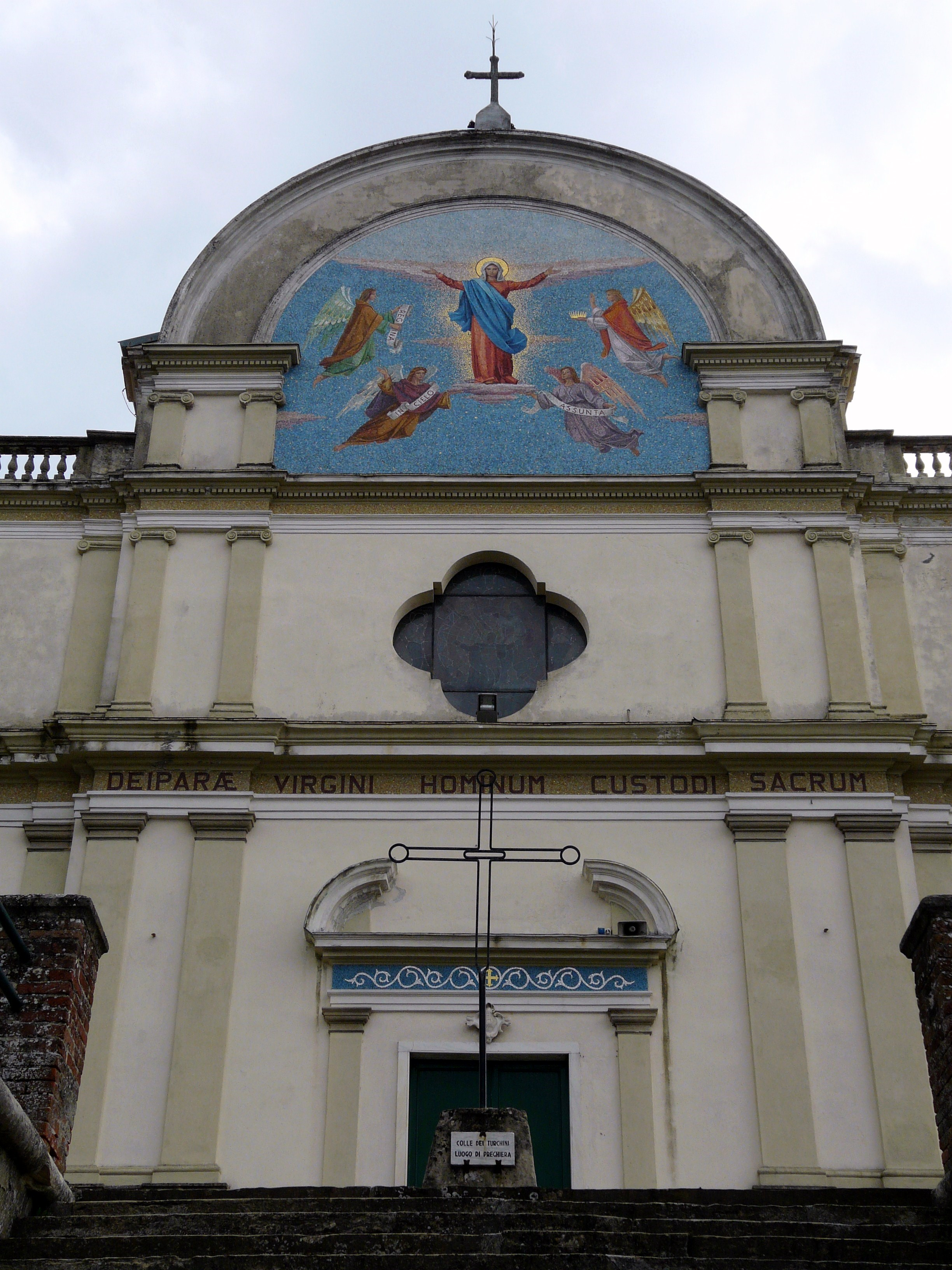 Santuario della Guardia, Gavi, Piemonte, Italia